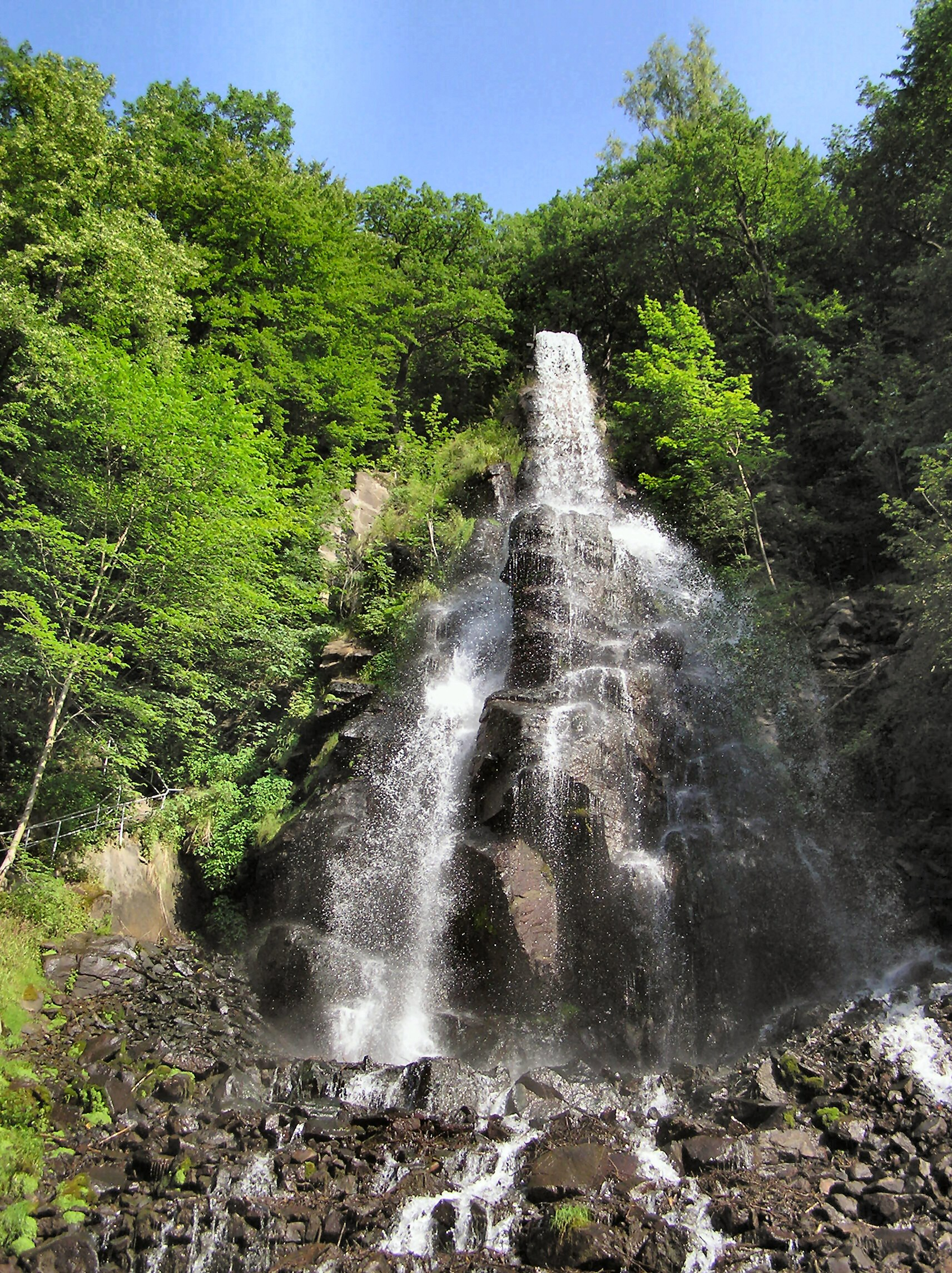 Trusetaler Wasserfall